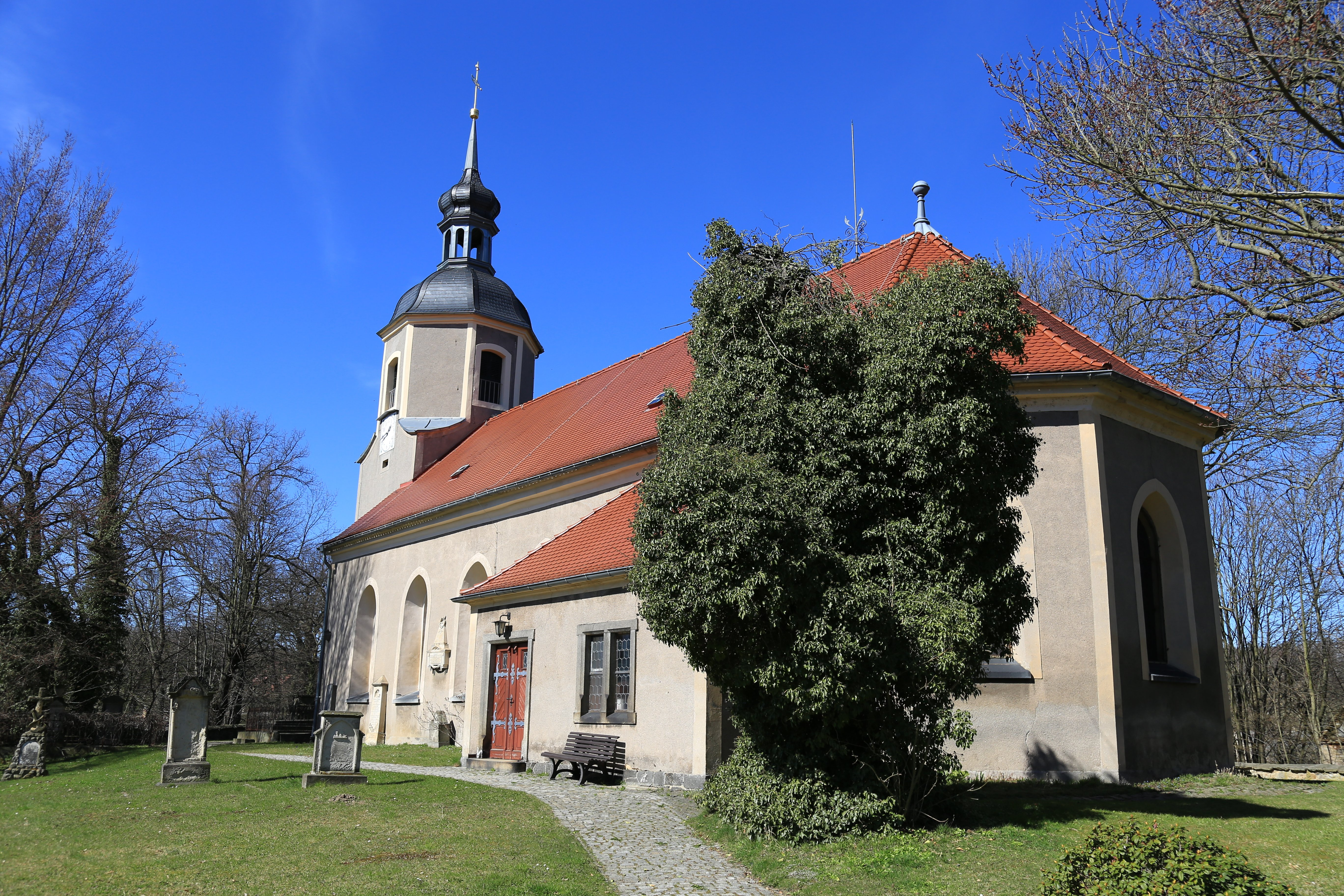 Kirche Schmölln-Putzkau März 2017 (2) Hornjoserbsce: Ewangelska cyrkej w Smělnej